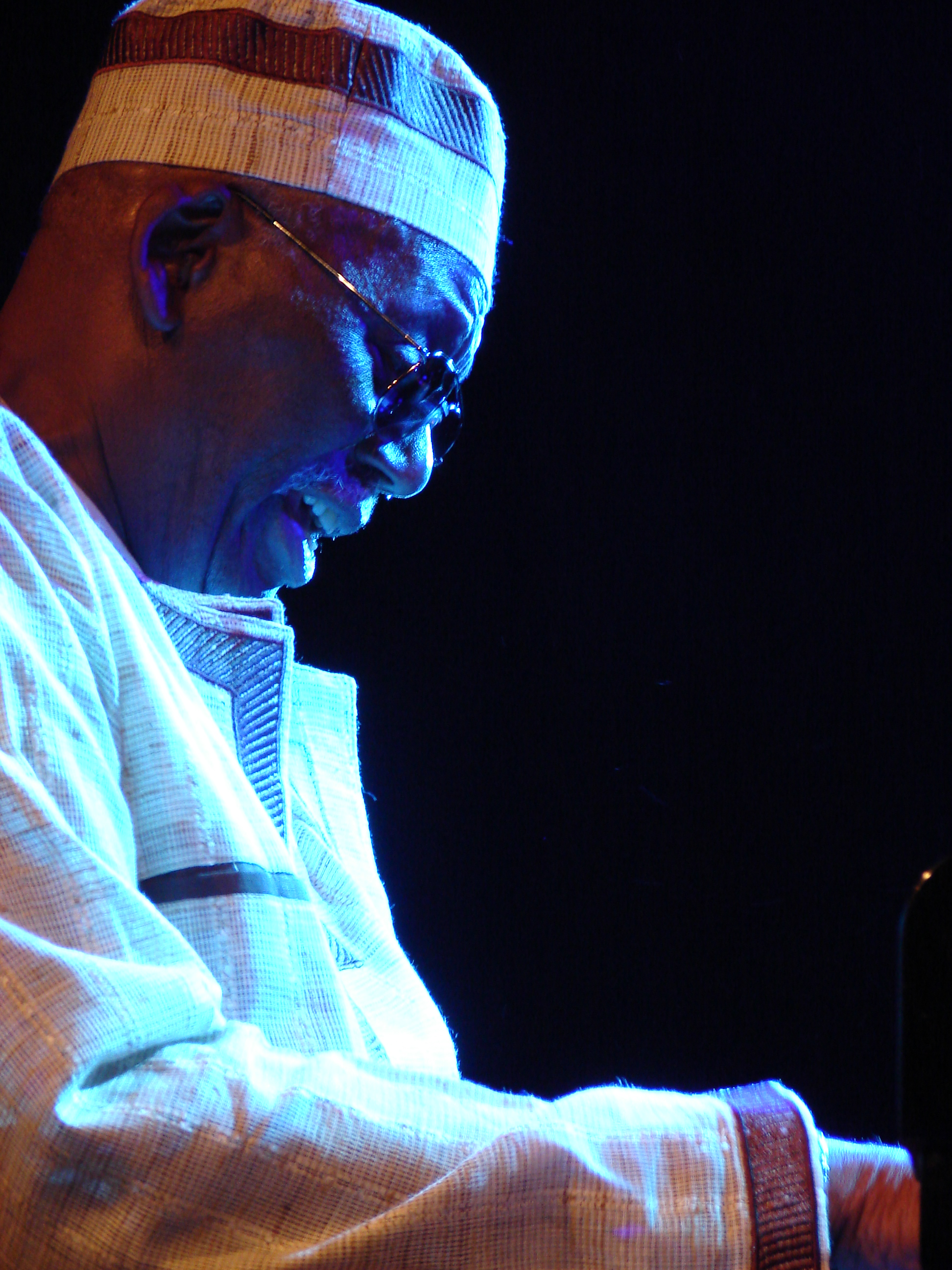 Jazz pianist Randy Weston